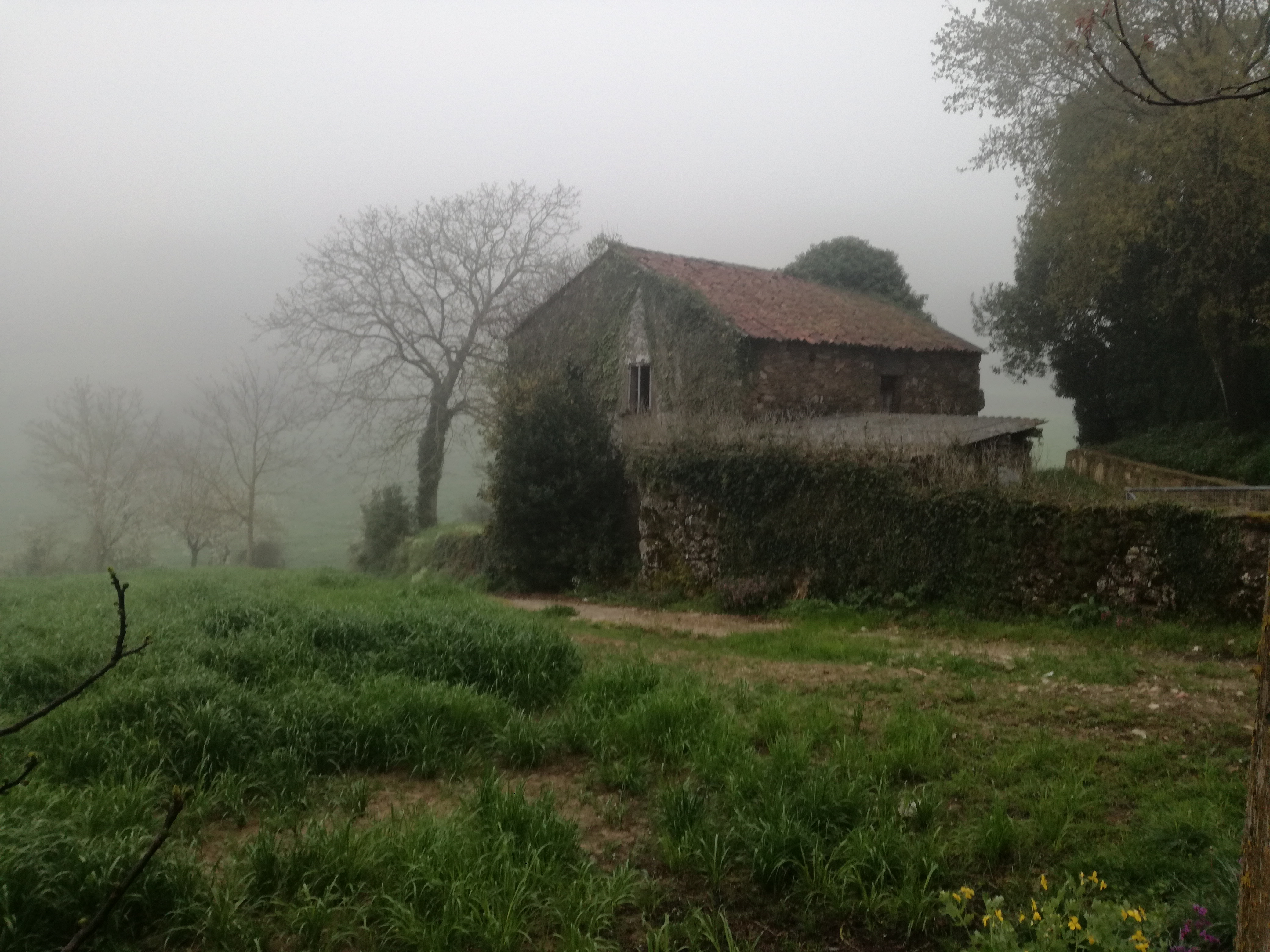 Es una casa muy antigüa a la cual tendrá 80 años y en esta vivia gente que ya ha fallecido